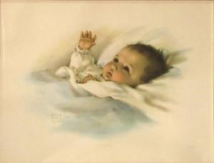 foto van ingelijst werkje